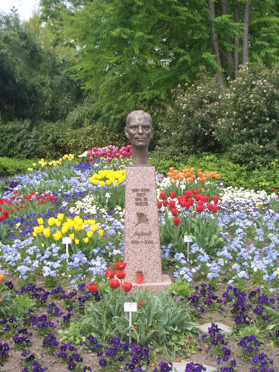 Denkmal für Lennart Bernadotte, Graf av Wisborg, auf der Insel Mainau